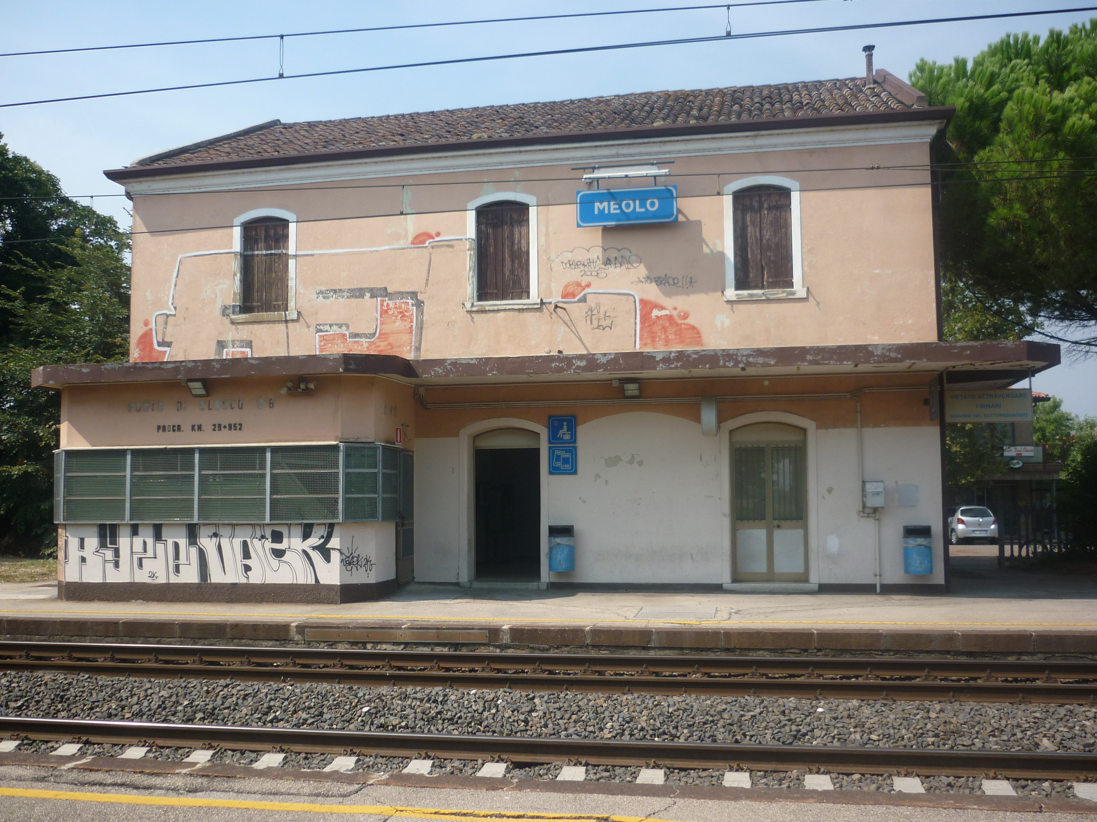 fs